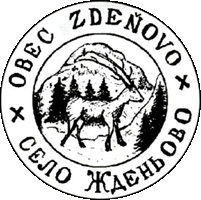 Печать поселка Ждениево времён вхождения в Чехословакию 1919 год. На печати изображен олень на фоне деревьев и горных вершин. Материалы книги Б.Мариконь, В.Ньорба "Геральдика Закарпатья" (2010)